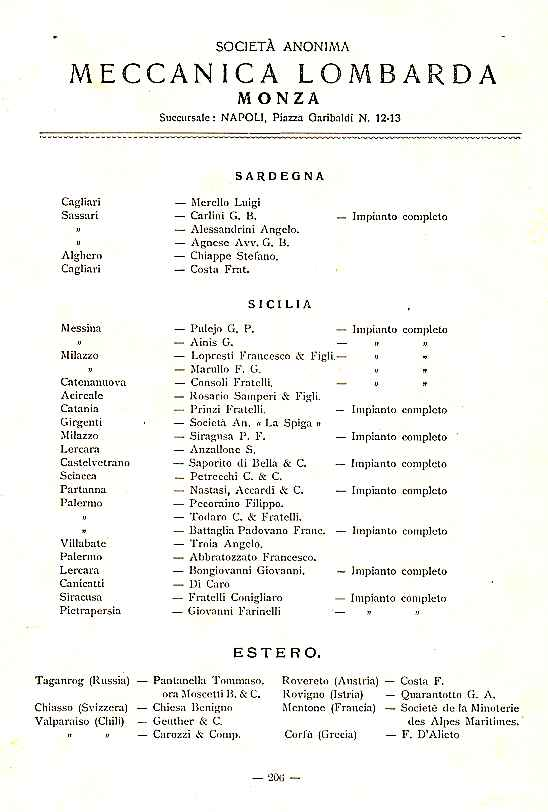 Società Anonima Meccanica Lombarda - Elenco dei molini eseguiti in Italia e all'estero pag. 206